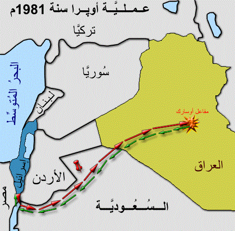 خارطة تُبيِّنُ مسار عمليَّة أوبرا، وقصف مفاعل أوسارك العراقي.